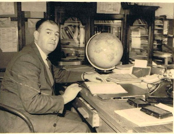 A son bureau, le directeur-fondateur Marcel Payan (1909-2006)- «Villa Les Eucalyptus» - au Centre d'apprentissage Georges Lamarque à Nice (Alpes Maritimes) France